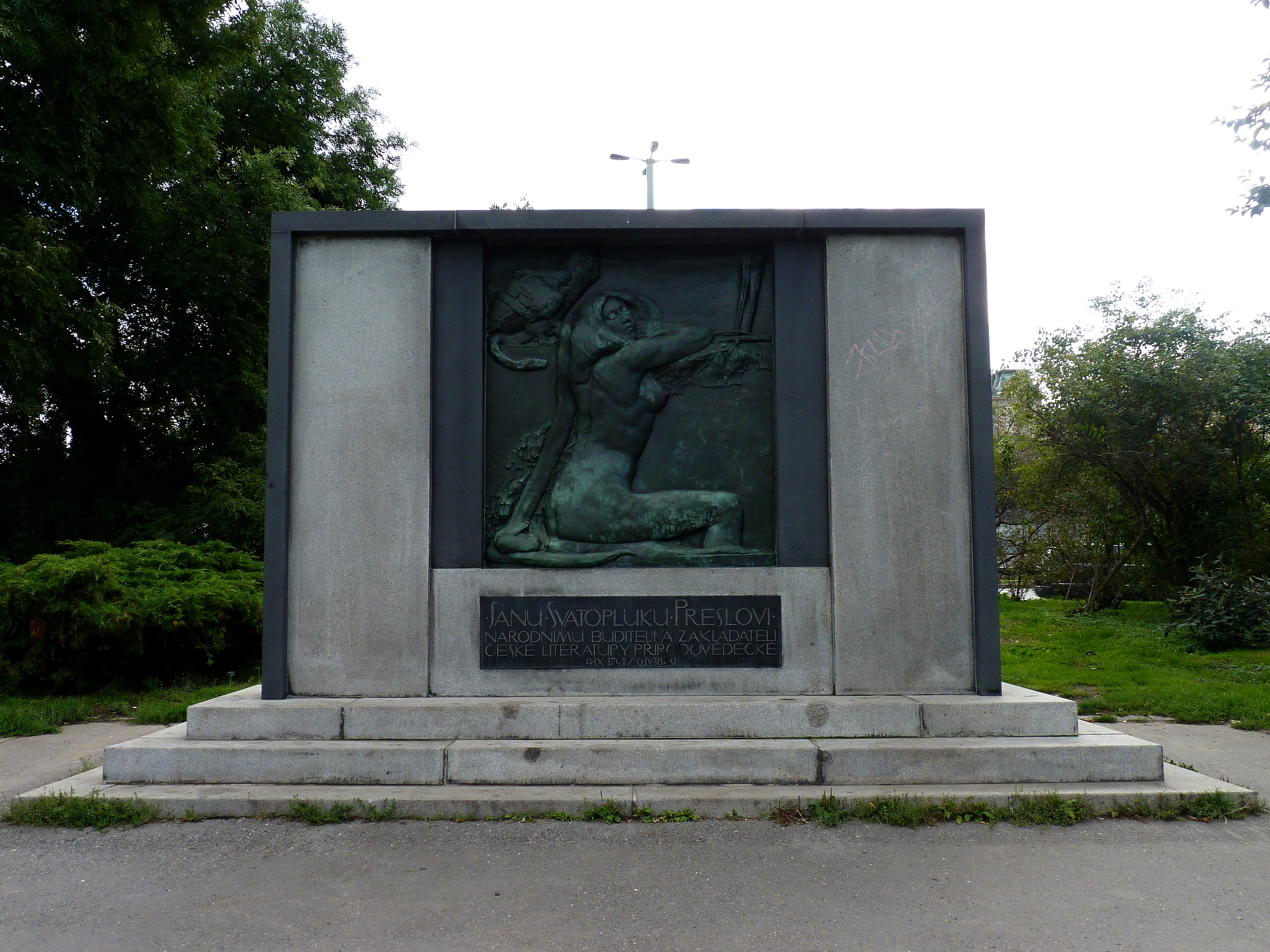 Pomník Jana Svatopluka Presla, Praha 1, Vrchlického sady